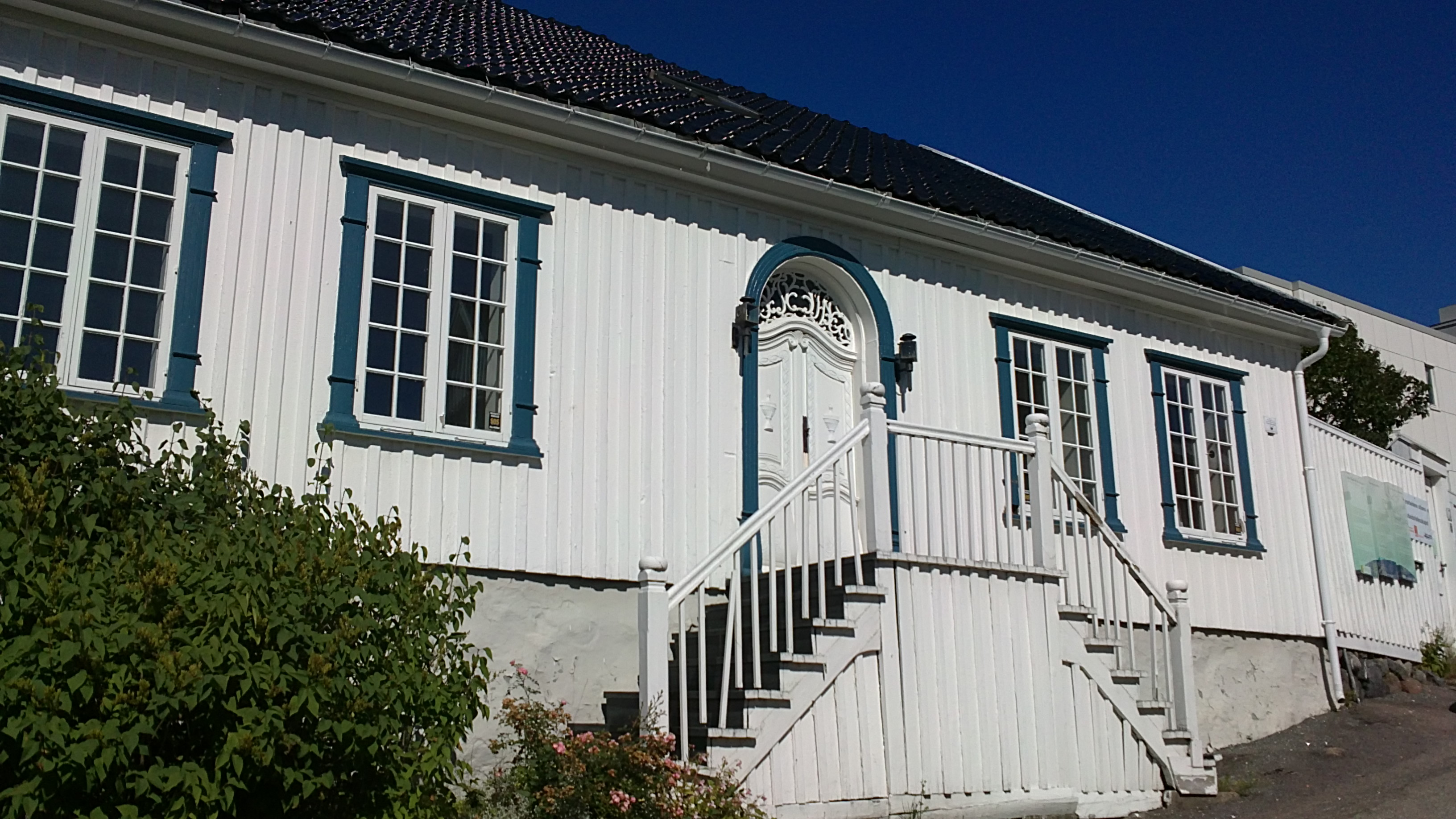 Bilde av Thor Heyerdahls barndomshjem